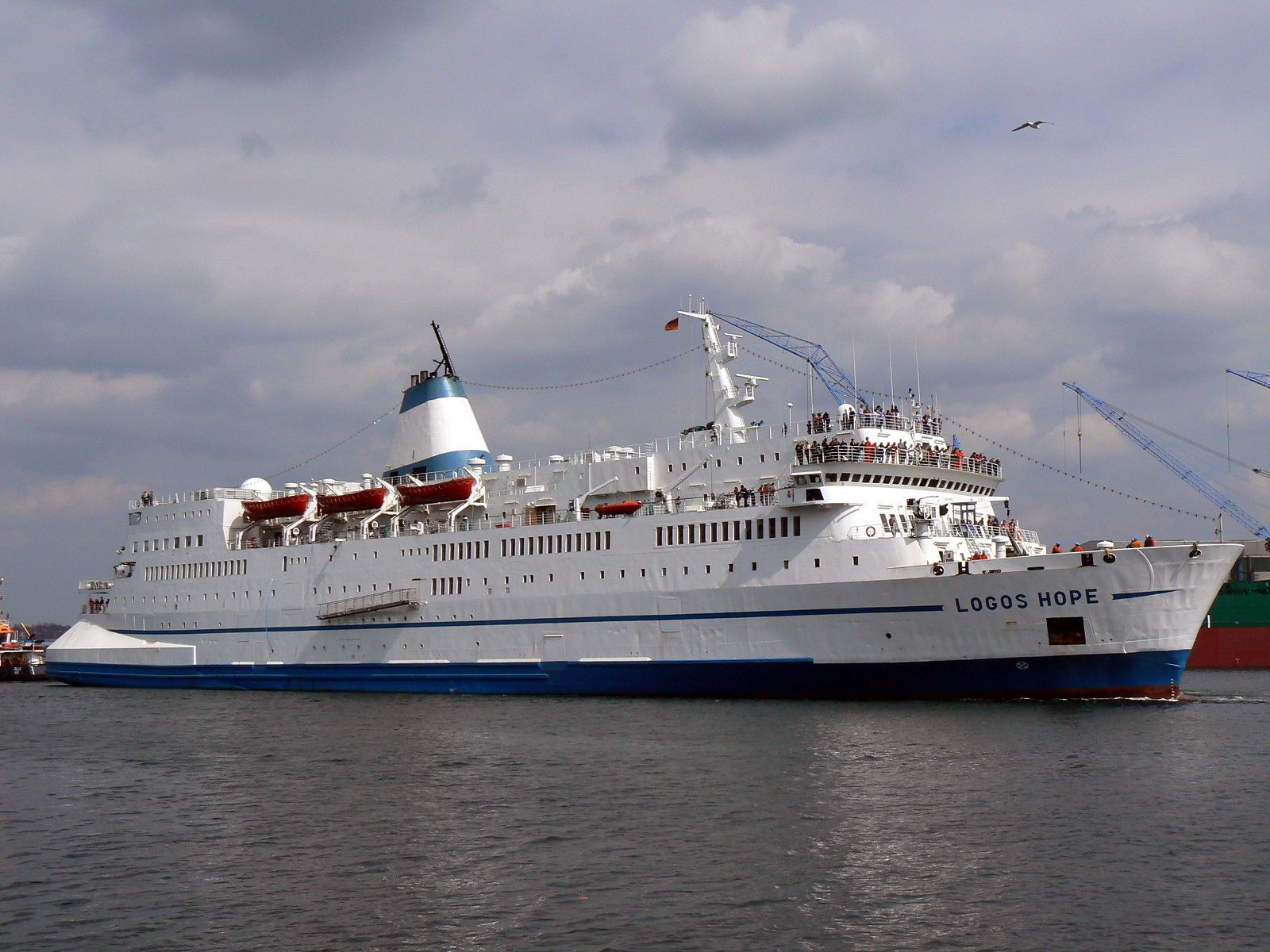 Das christliche Hilfsschiff Logos Hope von der Organisation "Operation Mobilisation" in Kiel. Gebaut 1973 als Autofähre "Gustav Vasa" in Rendsburg. IMO Number: 7302914 MMSI Number: 231005000 Callsign: OZ2000 Length: 130 m Beam: 21 m